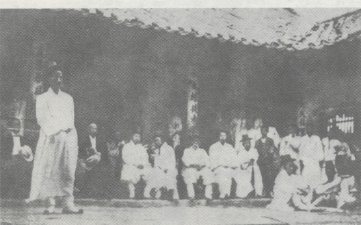 1906년 성경 연구자 표창식에서 표창을 수여하는 윤치호